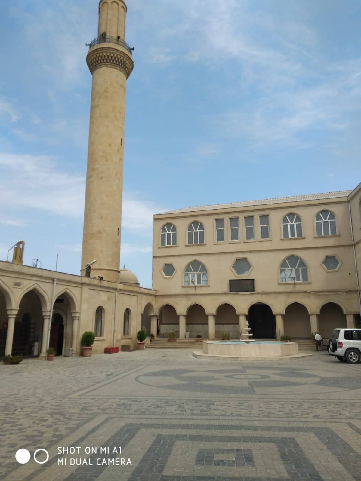 Maştağa Cümə məscidi